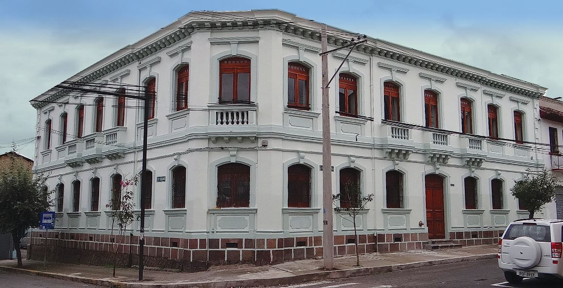 Casa Égüez Centro Cultural. Juan Larrea y Río de Janeiro. Quito, Ecuador.